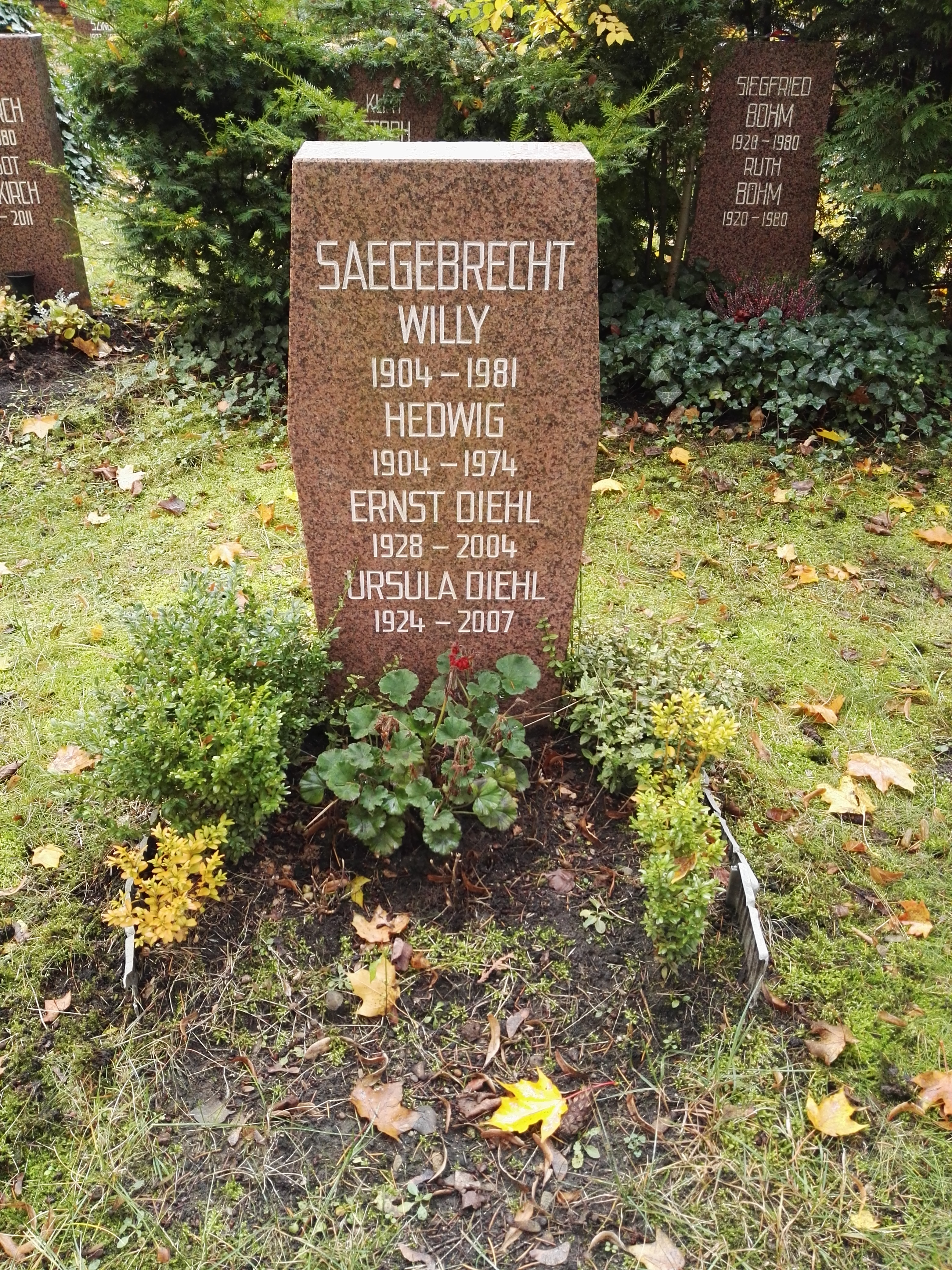 Grab von Willy Sägebrecht und Ernst Diehl jeweils mit Ehefrauen auf dem Sozialistenfriedhof des Zentralfriedhofs Friedrichsfelde